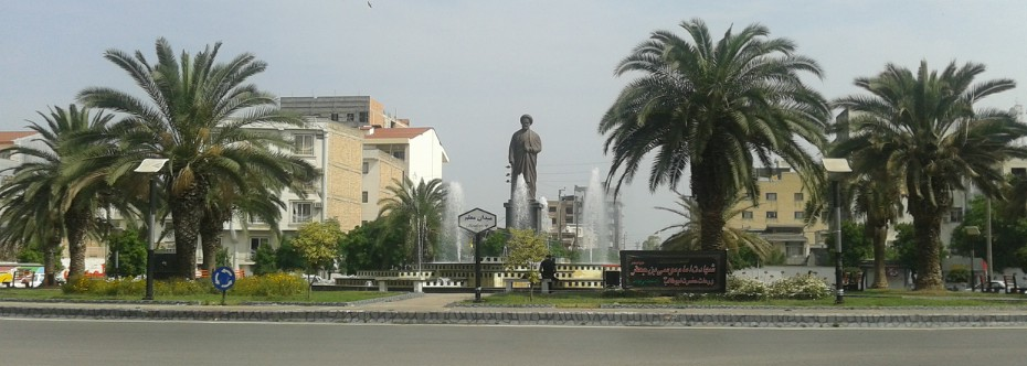 معلم ِمیدون، ساری دله